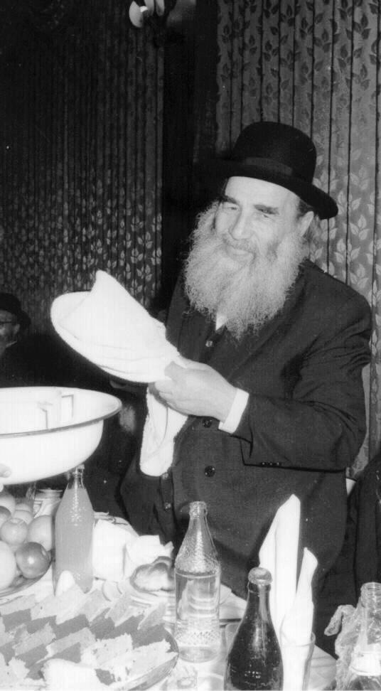 חתנו של הגאון מבריסק